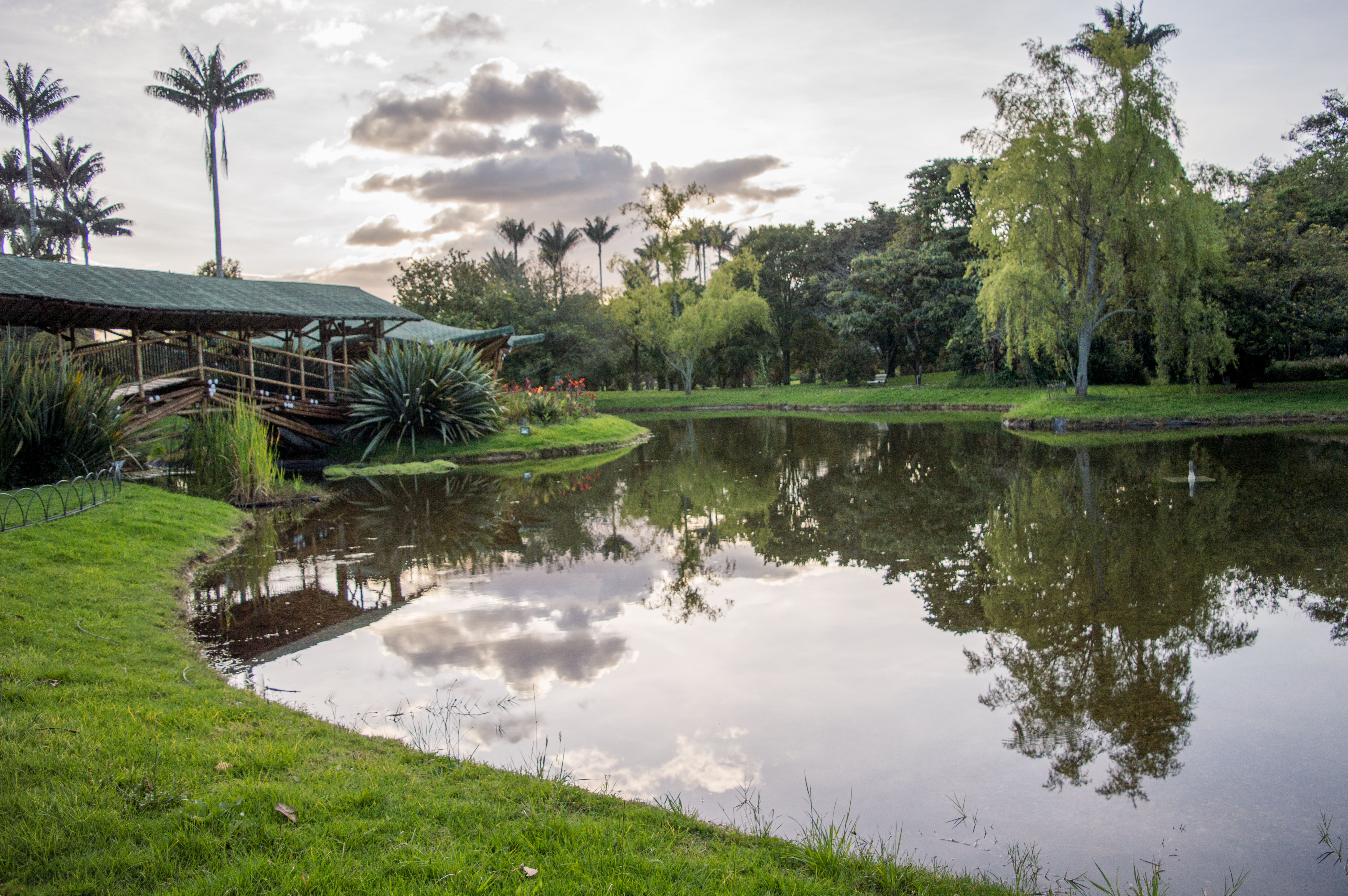 botanical garden Jose Celestino Mutis